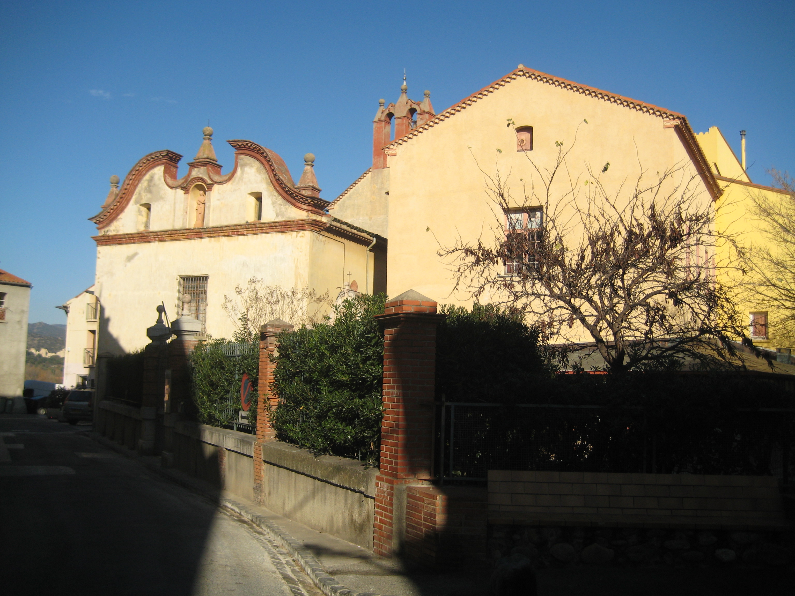 Hospice Saint-Jacques d'Ille-sur-Têt